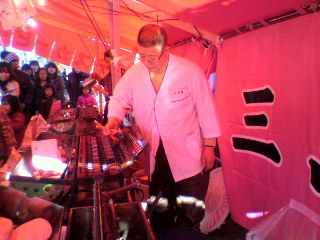 ベビーカステラの老舗 三島屋の初代大将